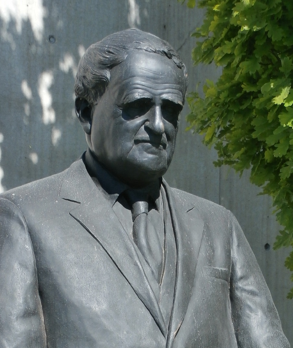 Alvaro D'Ors busto